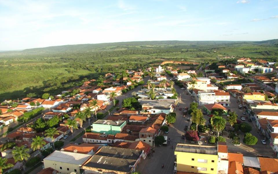 Imagens Jaborandi bahia